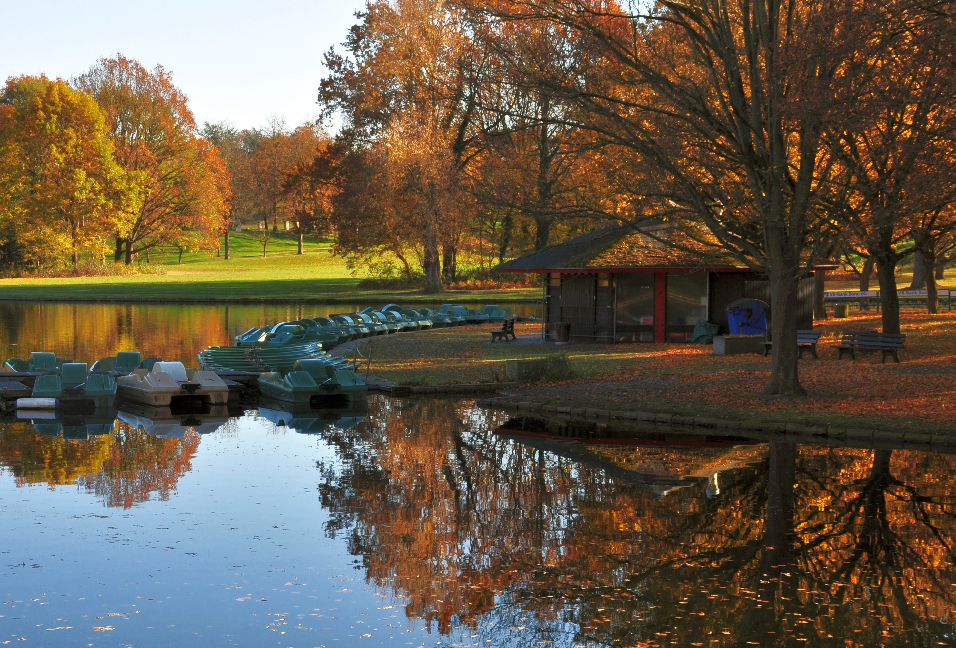 Rheinauensee mit Bootsverleih im Herbst 2018